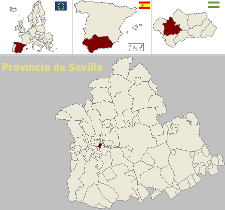 Situación del municipio de Camas (Sevilla)